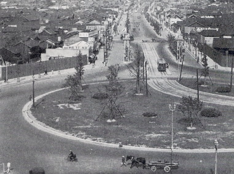 昭和13年ごろの名古屋駅前